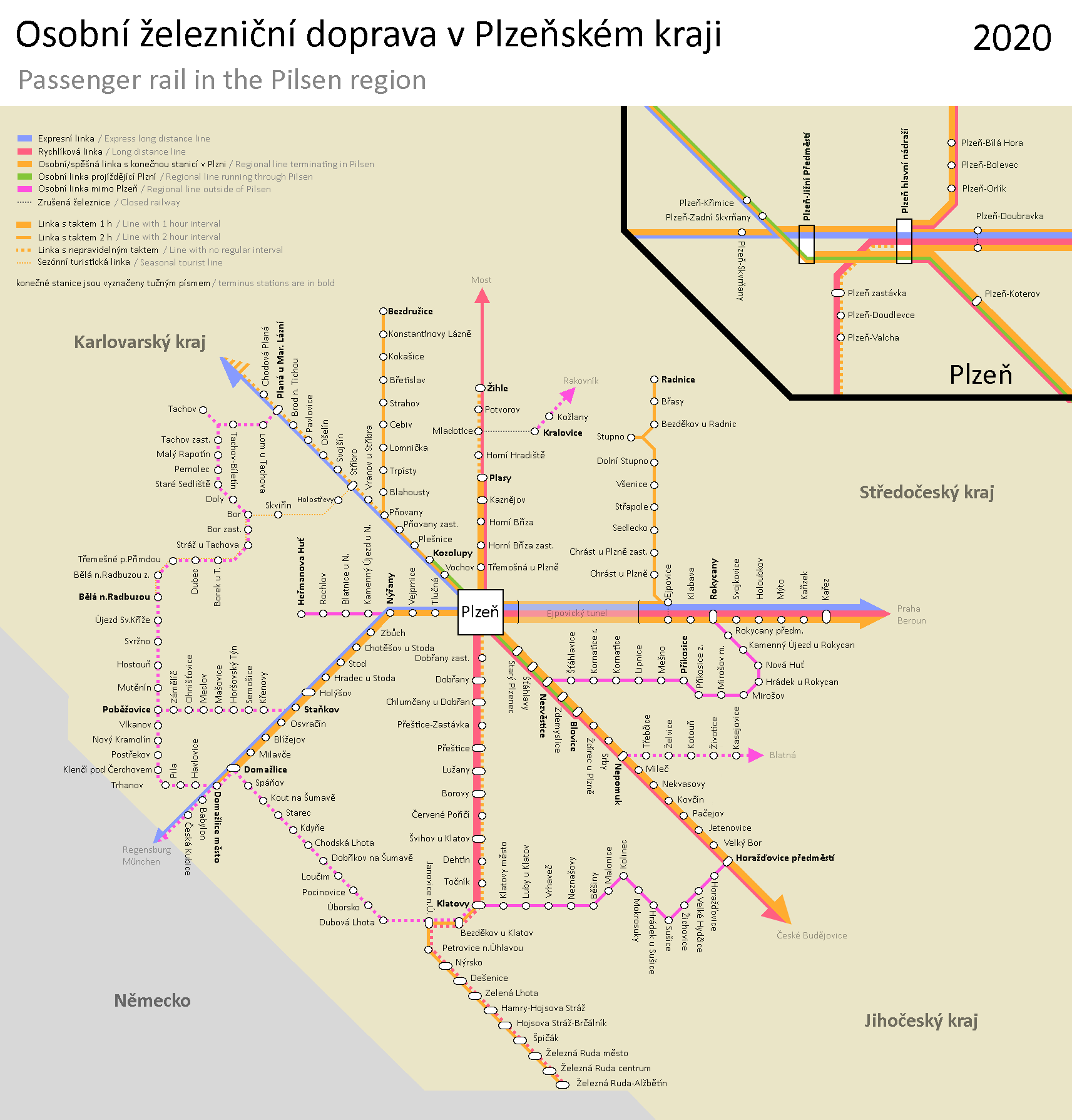 Mapa železniční dopravy v Plzeňském kraji v roce 2020